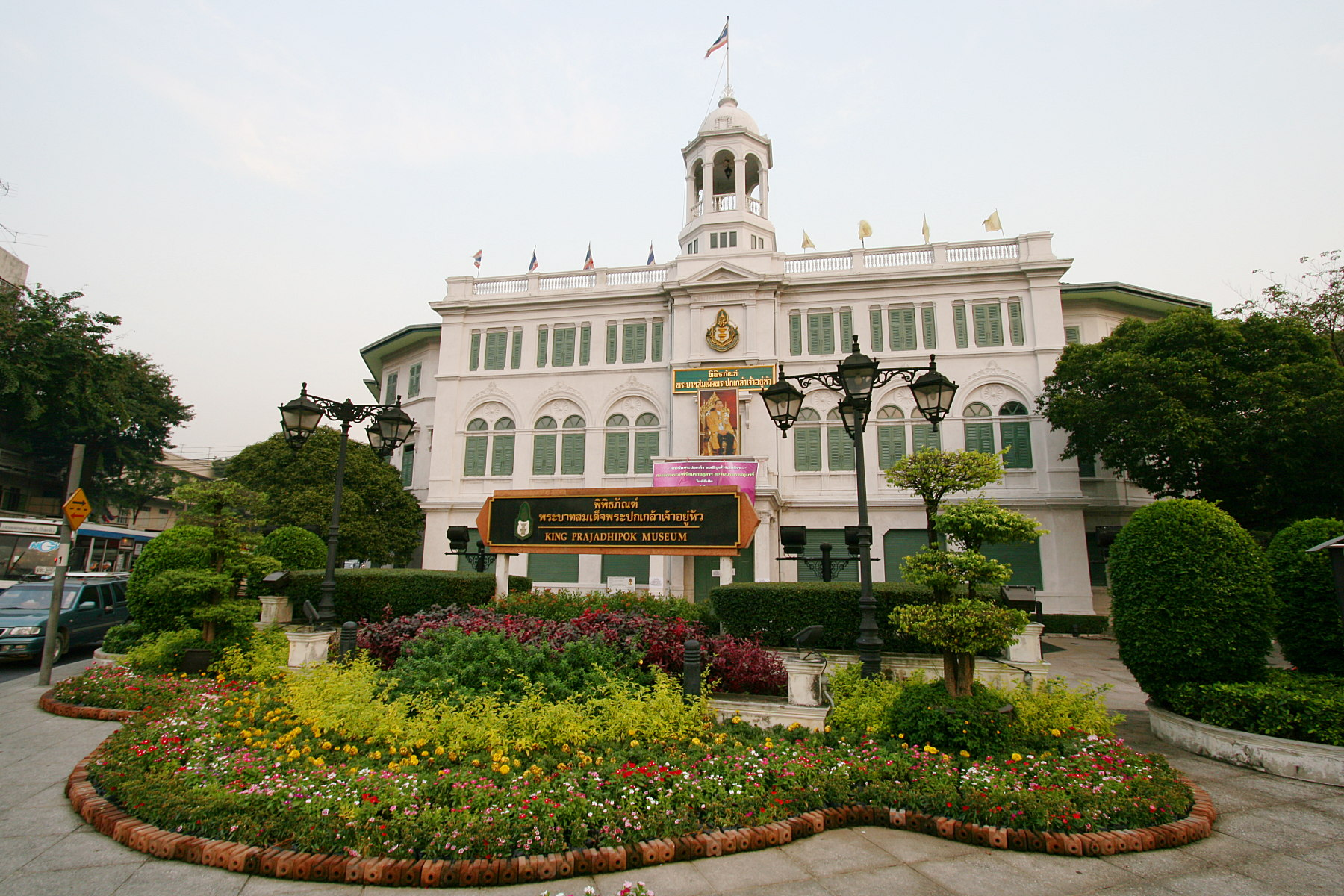 King Prajadhipok Museum, Pom Prap Sattru Phai district, Bangkok.